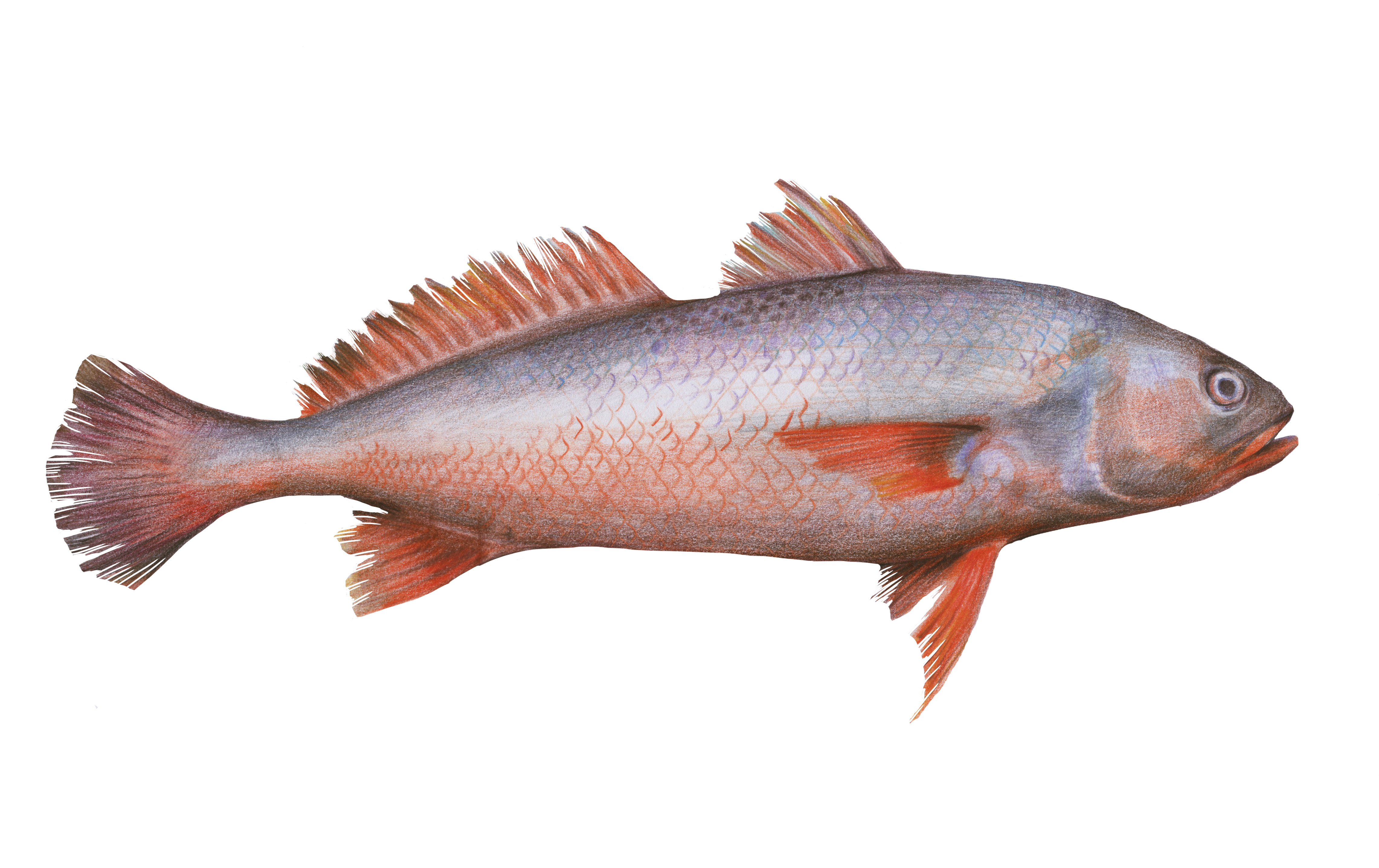 Desenho à lápis da pescada amarela. Desenho originalmente comissionado pela ONG Rare Brazil (